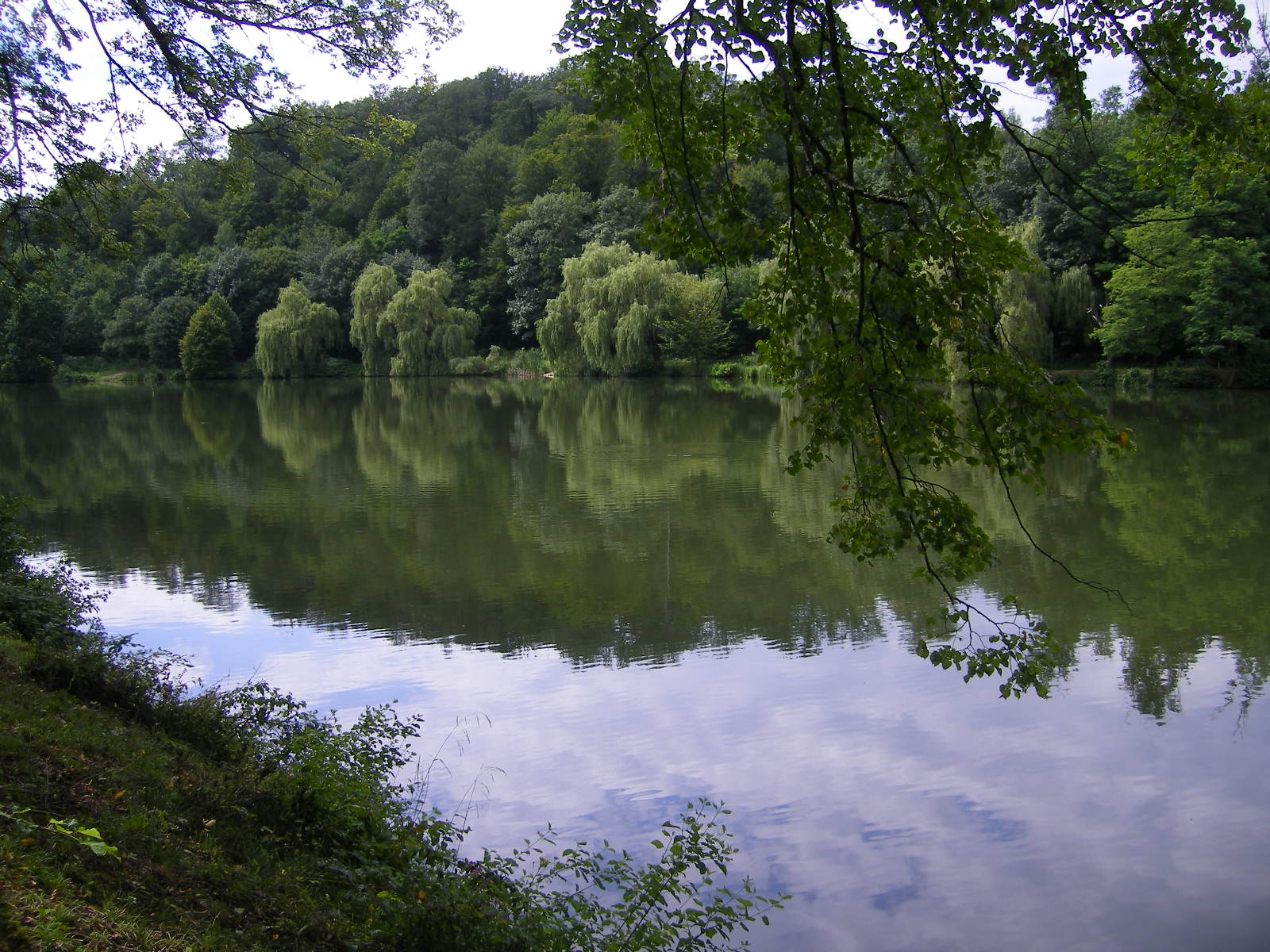 Jászó